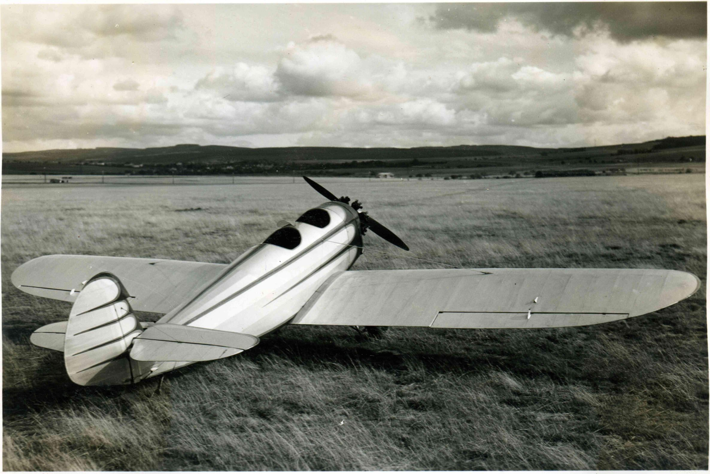 Foto der Fieseler F4, ein Sport- und Reiseflugzeug als verspannter Tiefdecker in Gemischtbauweise ausgeführt. Zwei Sitze hintereinander. Motor: Salmson AD 9, 40 PS. Entwickelt und gebaut bei dem Fieseler Flugzeugbau Kassel.